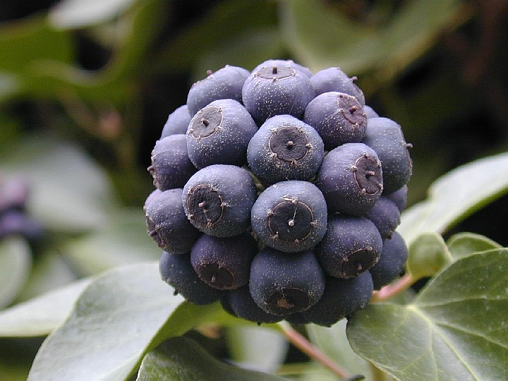 Hedera helix (Frucht)